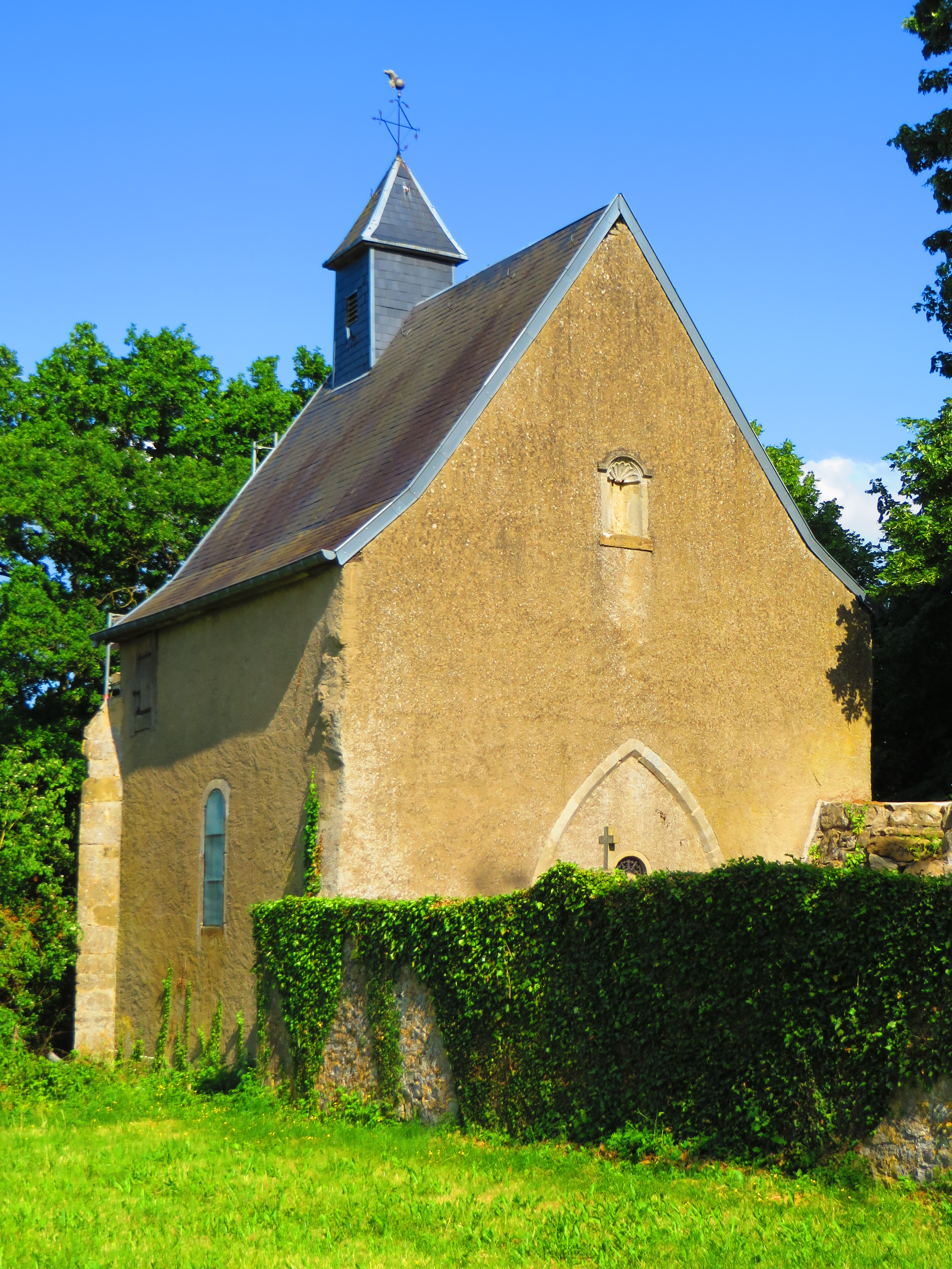 Mondorff chapelle